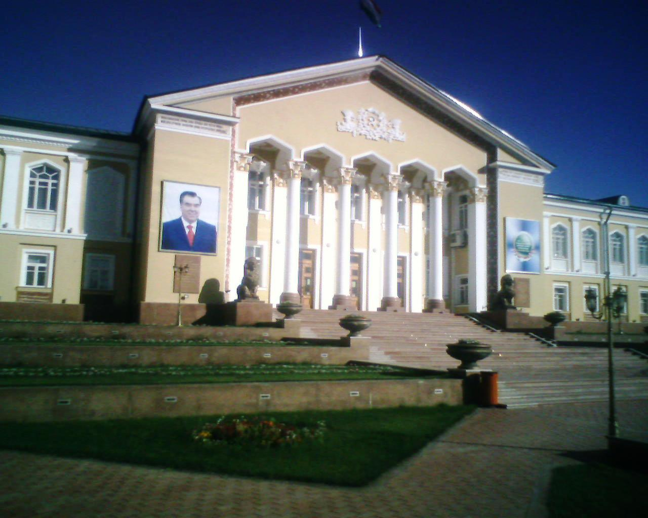 Дворец Арбоб в Согдийская обл. Таджикистан